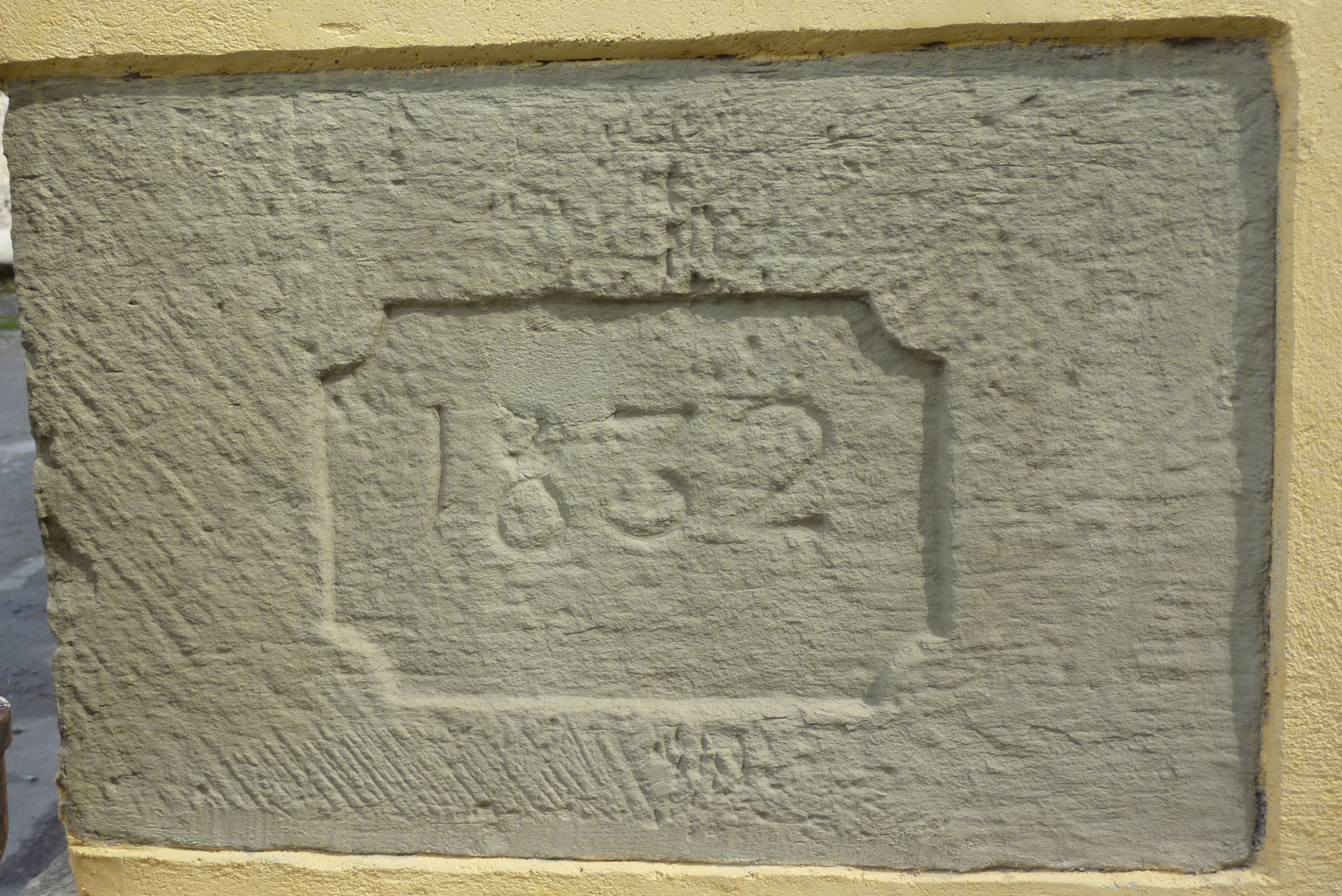 Grundstein der profanierten Synagoge in Rohrbach (Sinsheim)